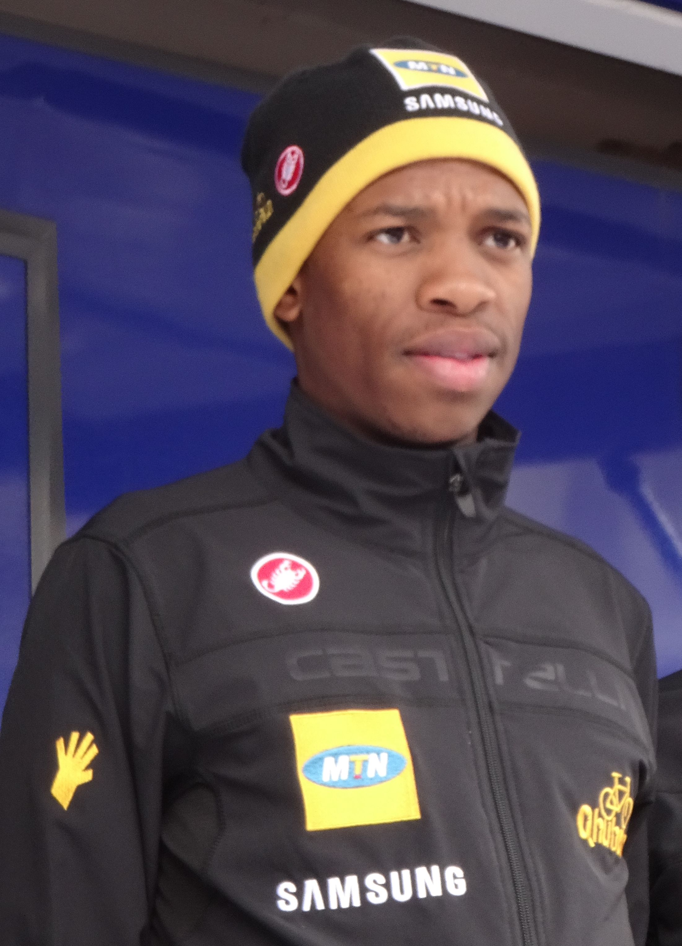 Reportage photographique réalisé le mercredi 7 mai 2014 au départ de la première étape de l'édition 2014 des Quatre jours de Dunkerque à Dunkerque, Nord, Nord-Pas-de-Calais, France. Depicted person: Songezo Jim Depicted team: MTN-Qhubeka